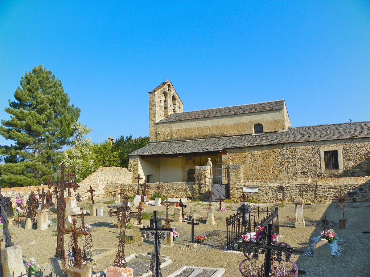 Església i cementiri de Sant Romà de Càldegues (Alta Cerdanya)